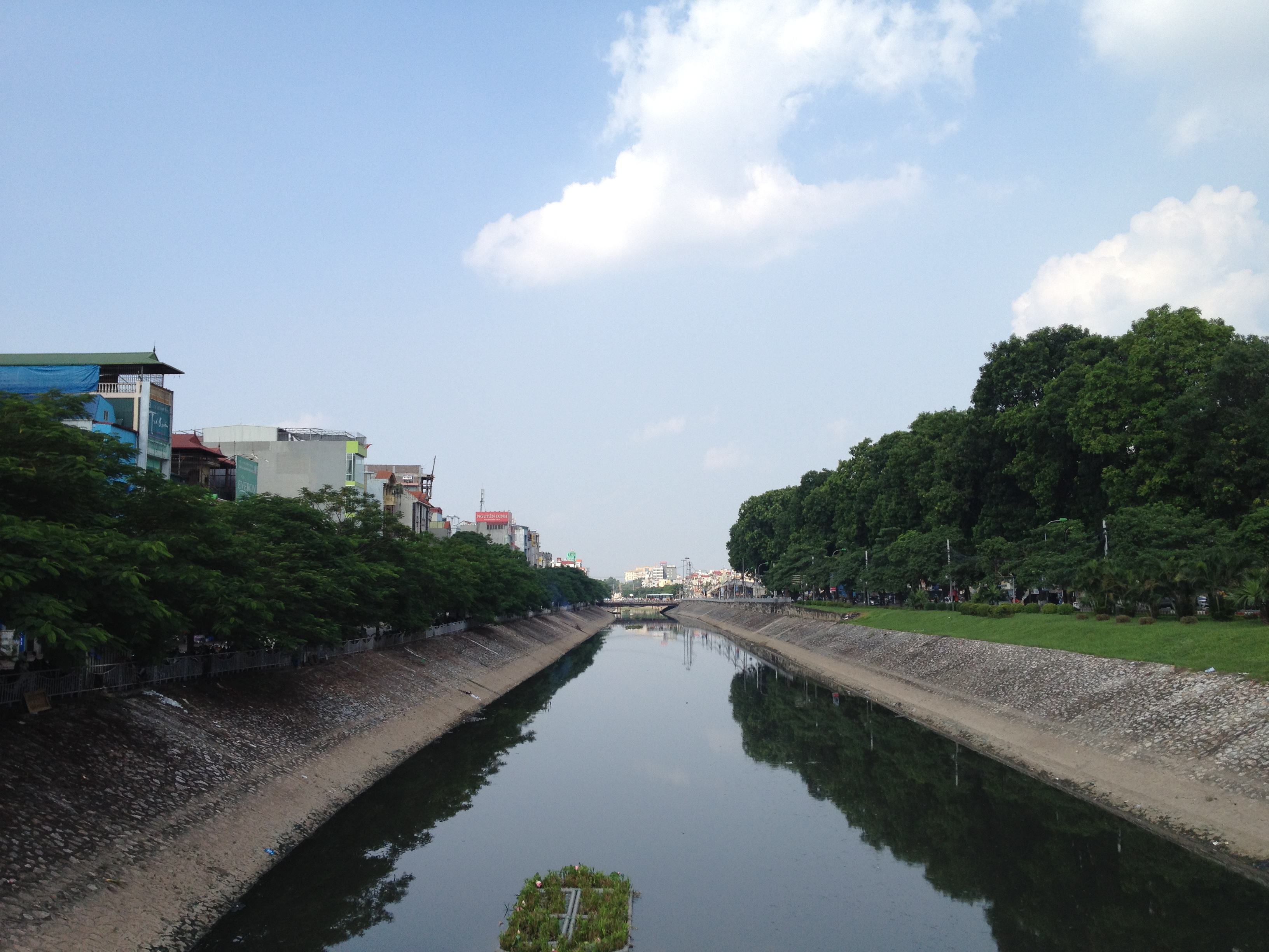 Hà Nội, Việt Nam.